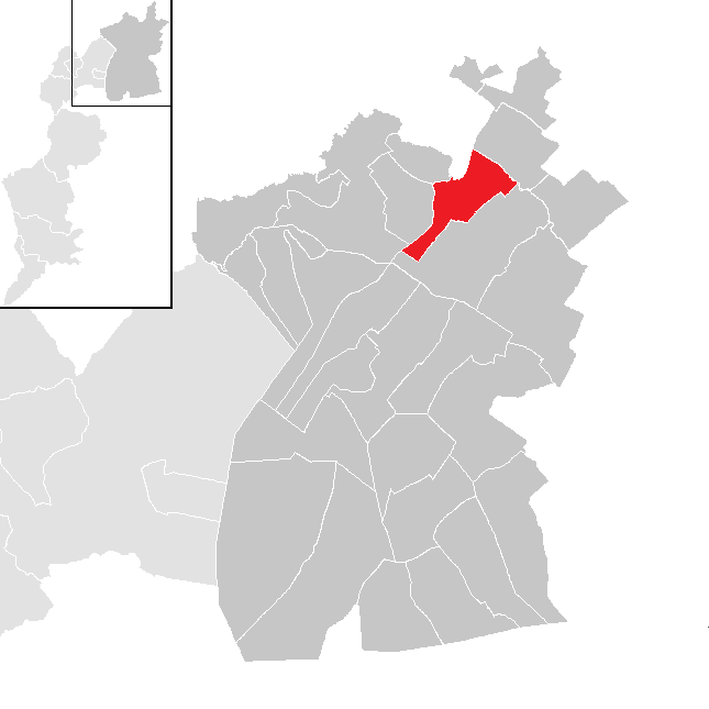 Bezirk Neudsiedl am See